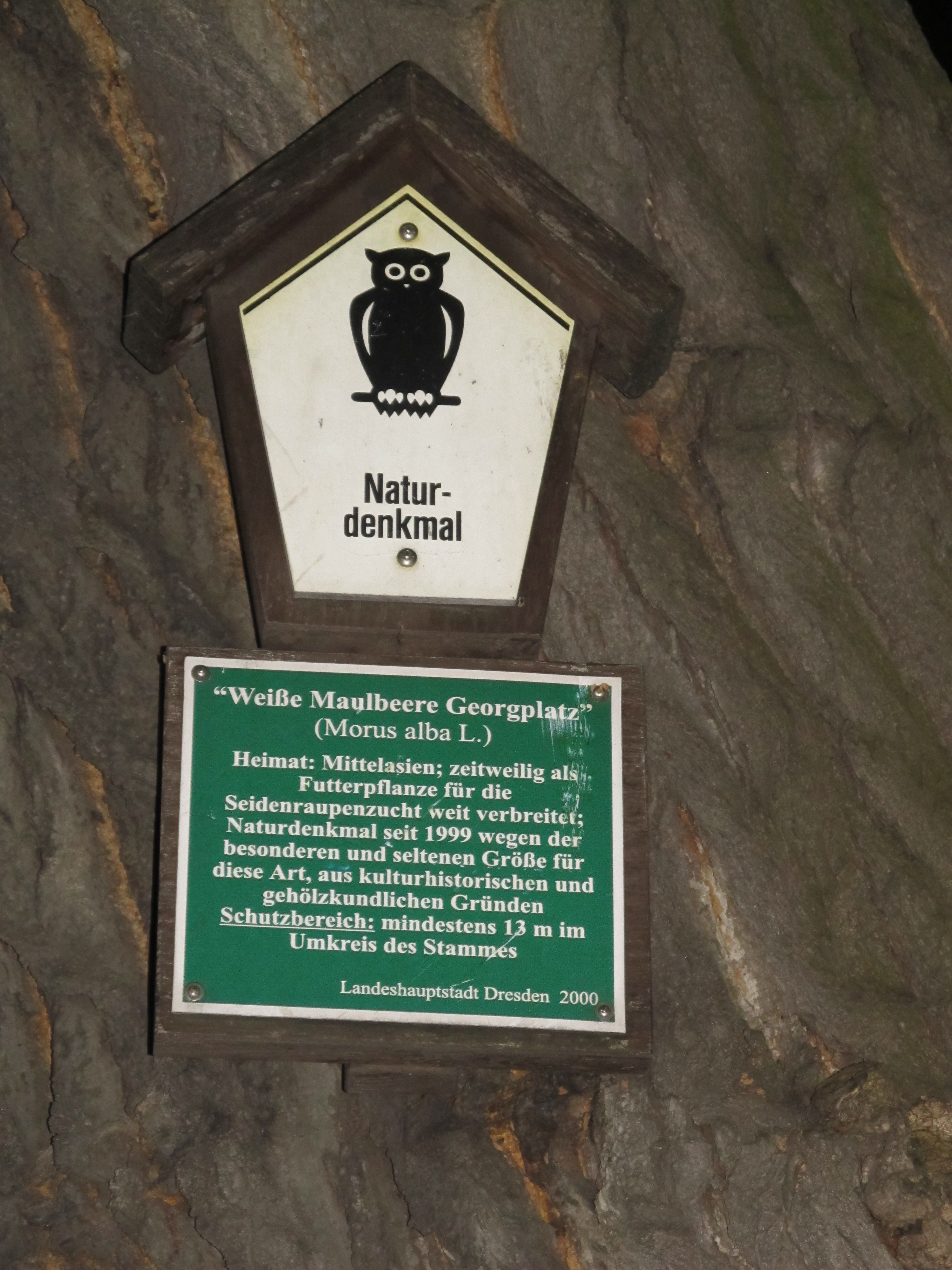 Hinweisschild am Naturdenkmal Weiße Maulbeere Georgplatz in Dresden